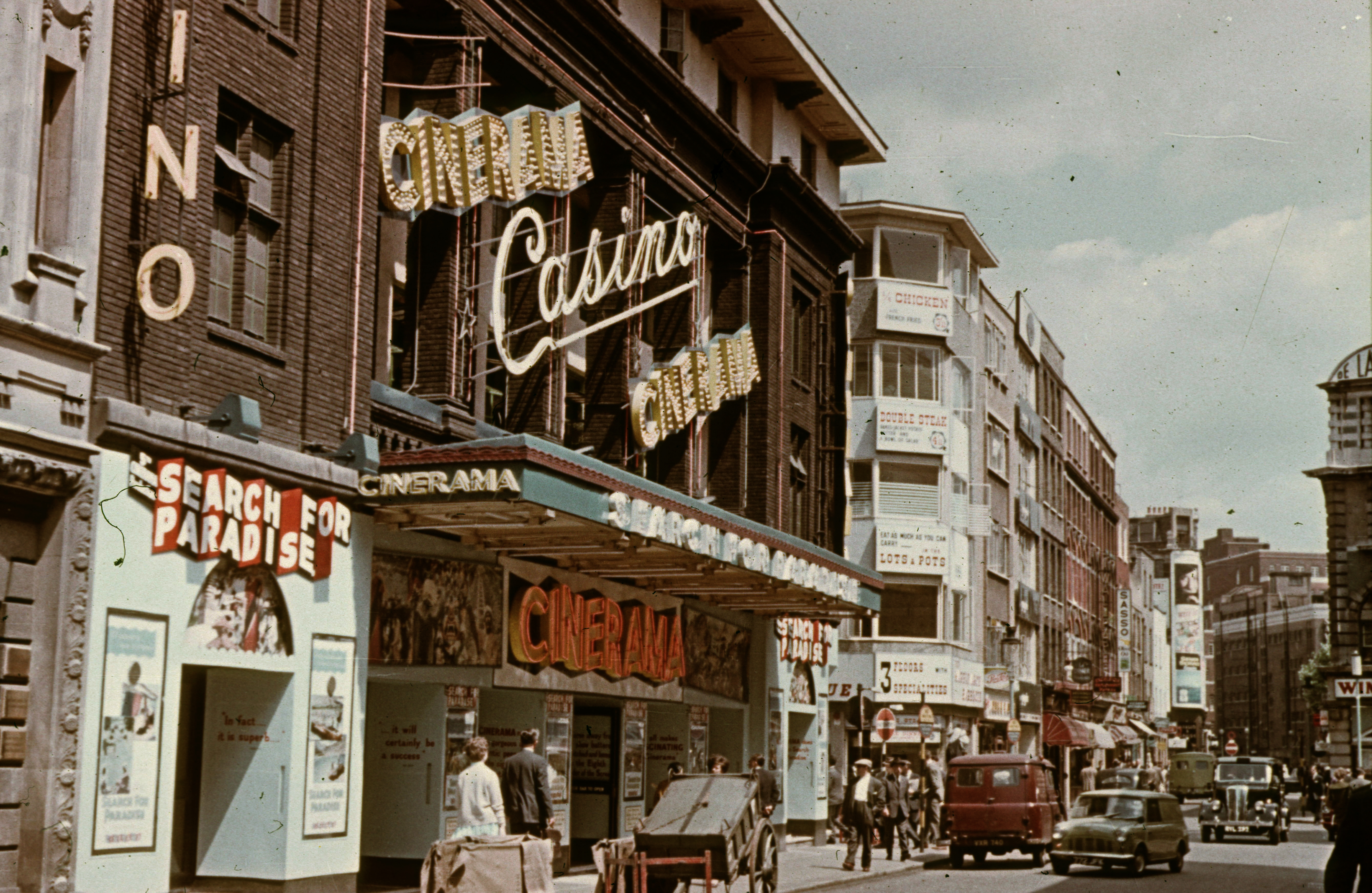 Old Compton Street. Location: United Kingdom Tags: movie theater, colorful Title: Old Compton Street.